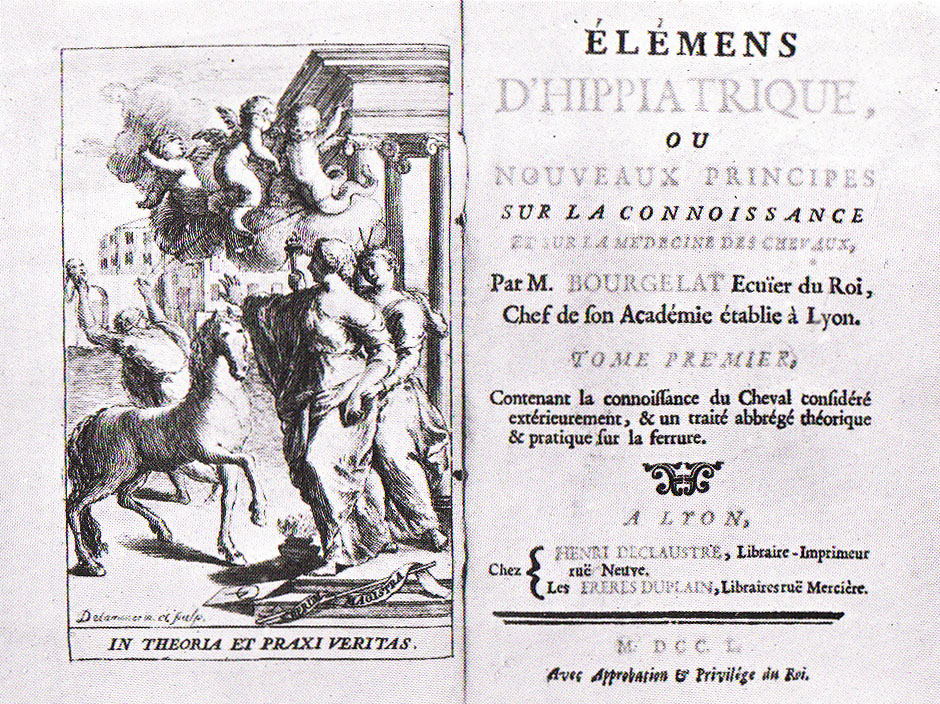 Frontispice et titre du tome premier des Elémens d’hippiatrique de Claude Bourgelat (1712–1779), Lyon 1750